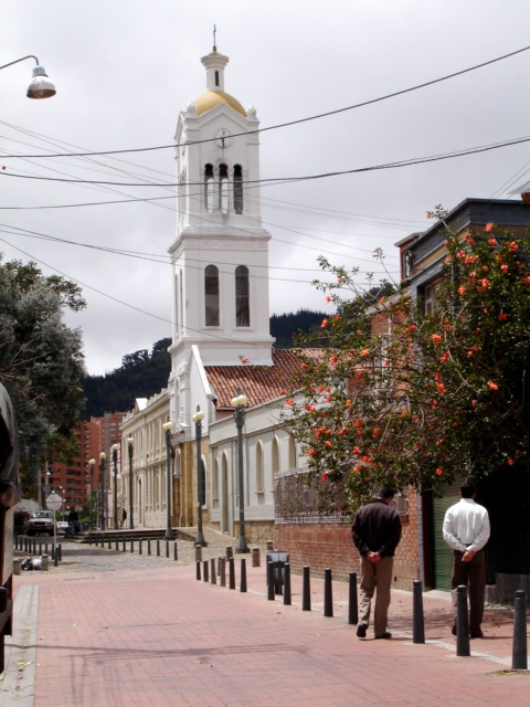 Iglesia principal . Usaquen. Bogota. 2006